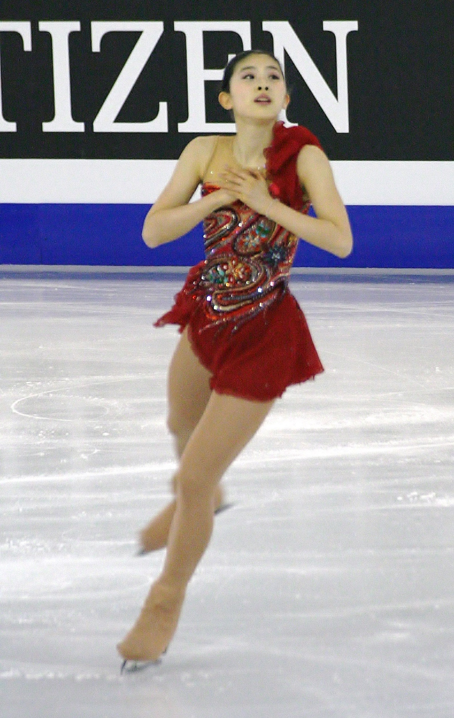 Юка Нагаи (Япония) на финале Гран-при среди юниоров 2014-2015.